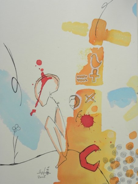 لوحه لشادي الدالي